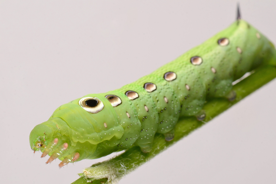 Sphingidae